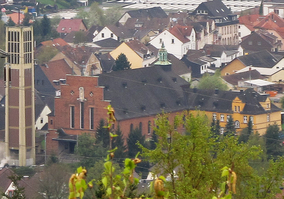 Blick vom Hoferkopfturm auf die katholische Pfarrkirche St. Marien bzw. Sieben Schmerzen Mariä in Friedrichsthal (Saar), Regionalverband Saarbrücken, Saarland